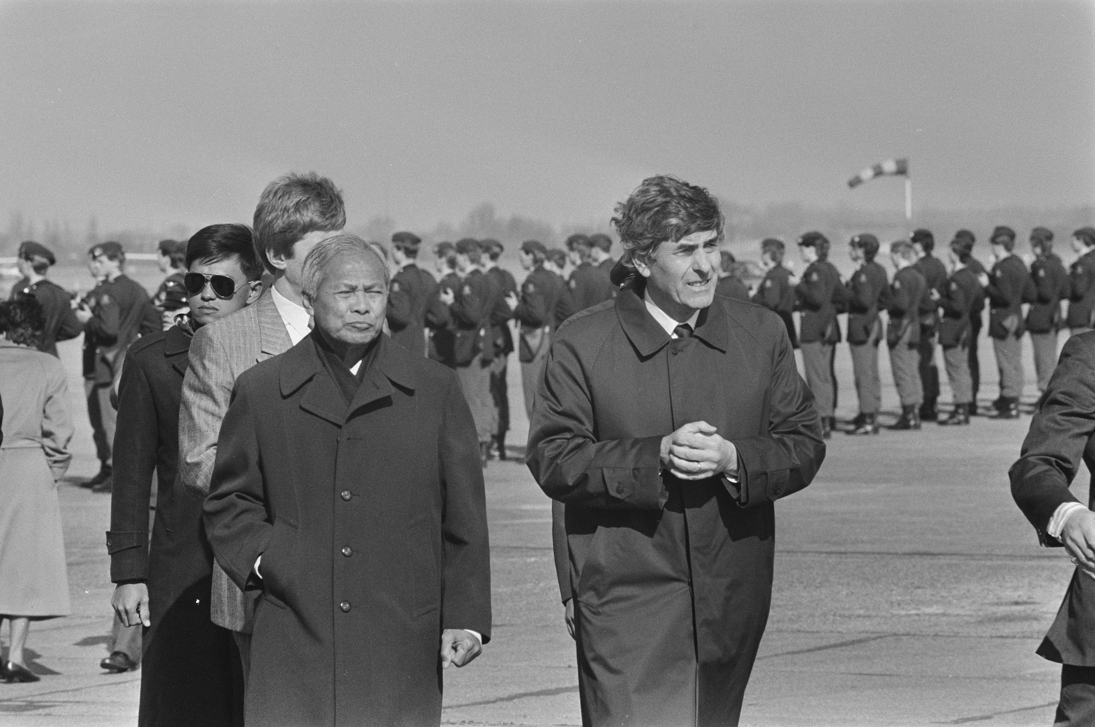 Collectie / Archief : Fotocollectie Anefo Reportage / Serie : [ onbekend ] Beschrijving : Aankomst Thaise premier Prem Tinsumlanonda op Zestienhoven afgehaald door premier Lubbers Datum : 10 maart 1987 Trefwoorden : aankomsten, premiers Persoonsnaam : Lubbers, Ruud, Premier Prem Tinsumlanon Instellingsnaam : Zestienhoven Fotograaf : Croes, Rob C. / Anefo Auteursrechthebbende : Nationaal Archief Materiaalsoort : Negatief (zwart/wit) Nummer archiefinventaris : bekijk toegang 2.24.01.05 Bestanddeelnummer : 933-9164